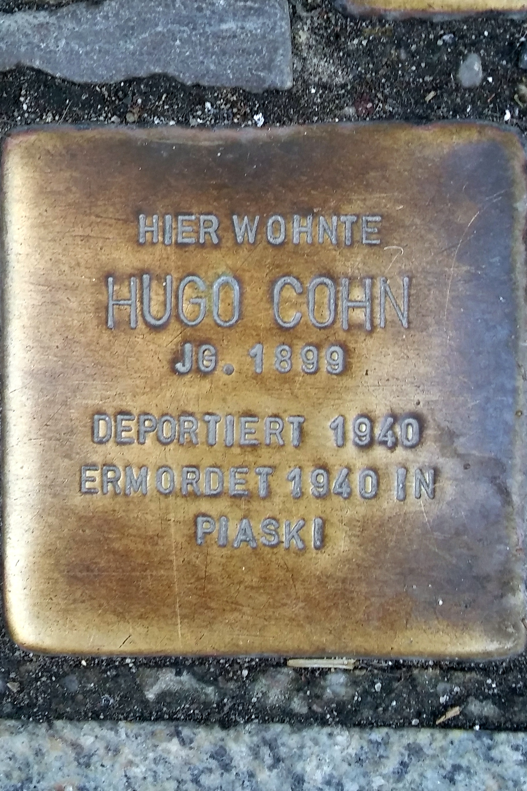 Stralsund, Mönchstraße 37, Stolperstein Hugo Cohn